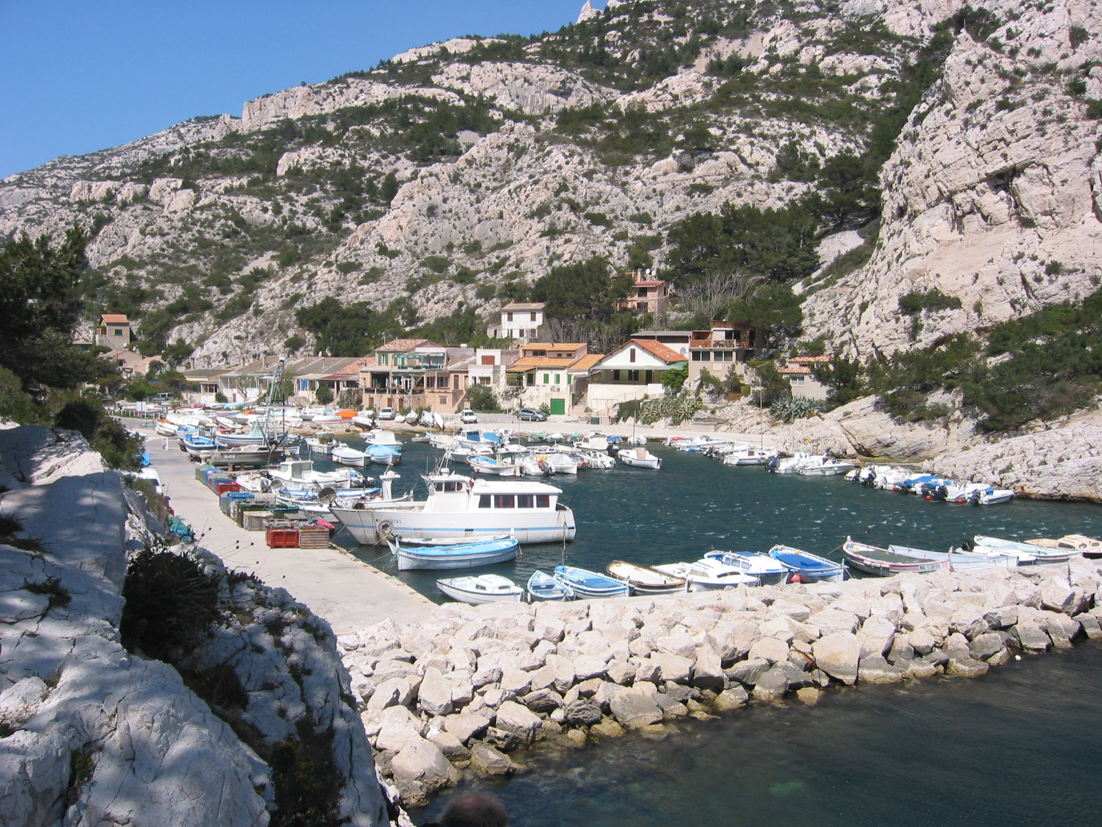 La Calanque de Morgiou. Marseille, Bouches-du-Rhône, France.